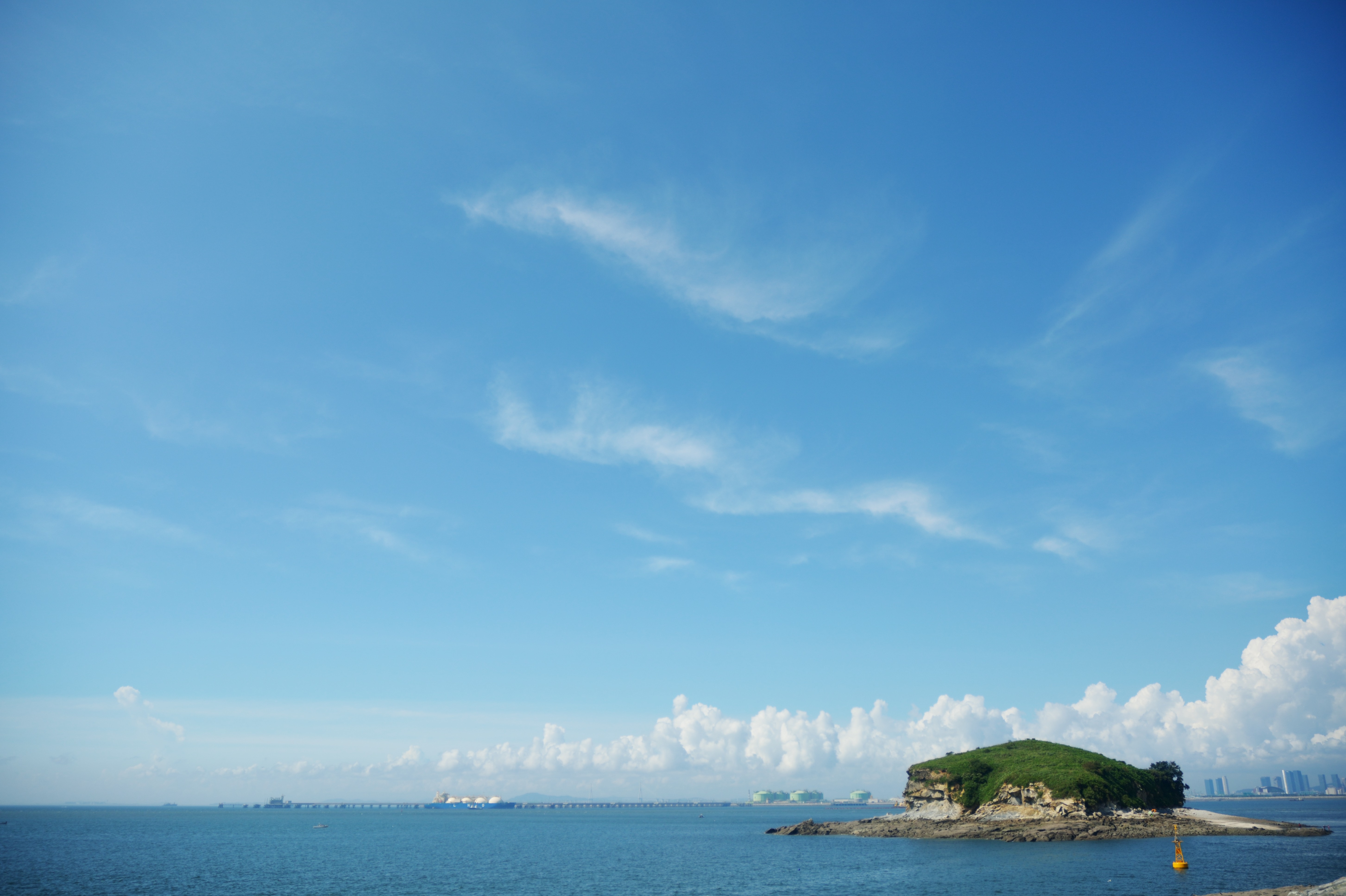 시화호조력발전소 휴게소에서 바라본 큰가리섬